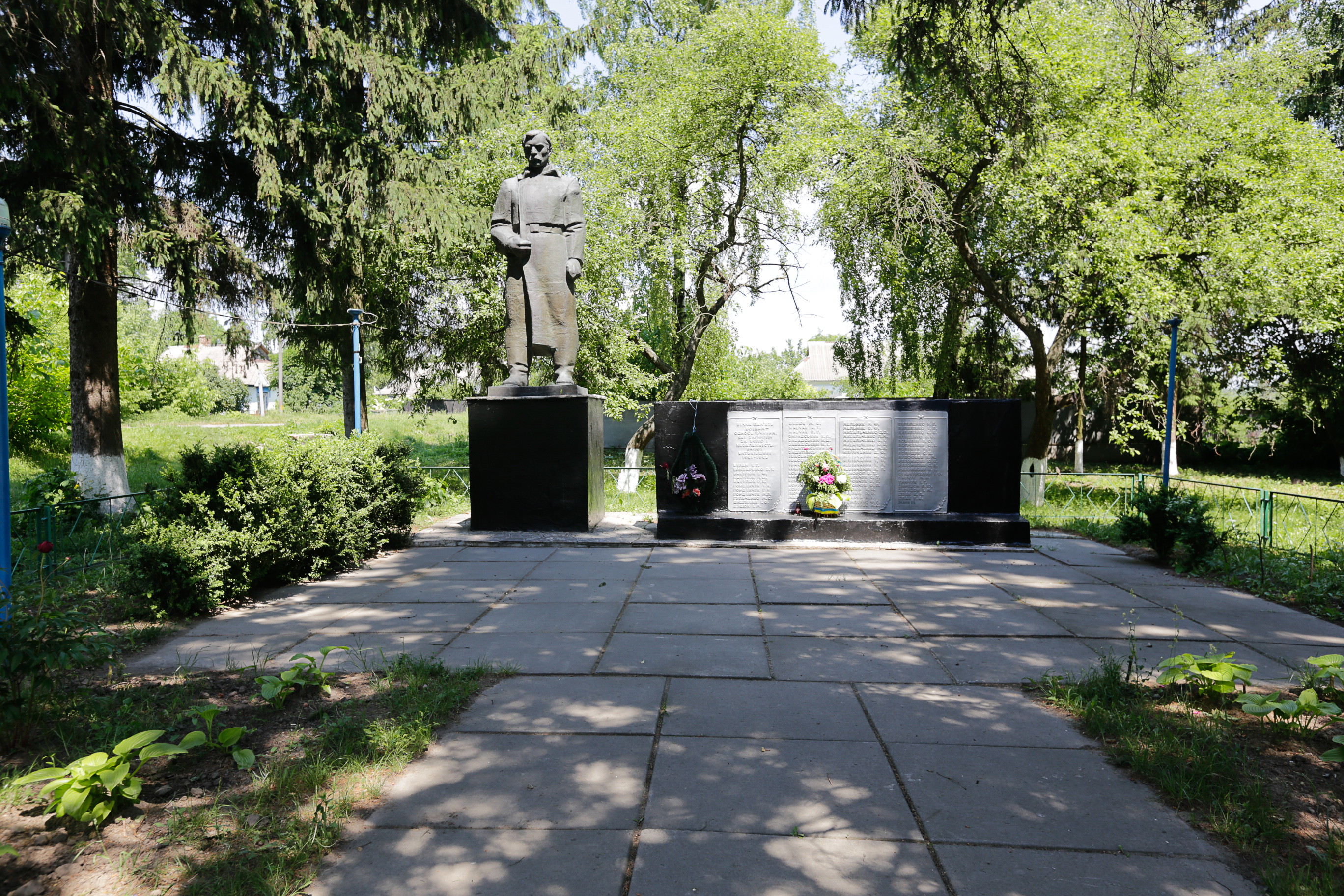 Пам'ятник Загиблим у Великой Вітчизняній Війни. с. Тадіївка. Київська область.